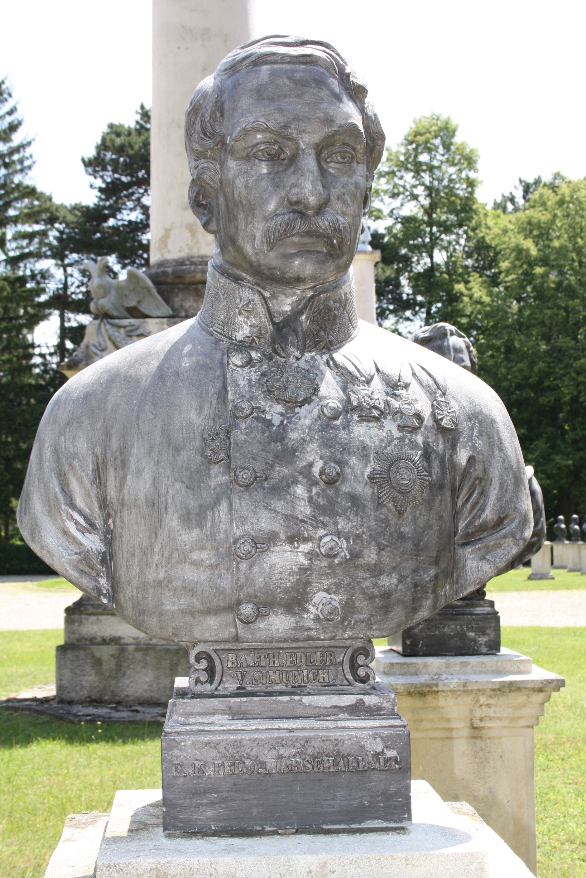 Büste in der Gedenkstätte Heldenberg (Niederösterreich)